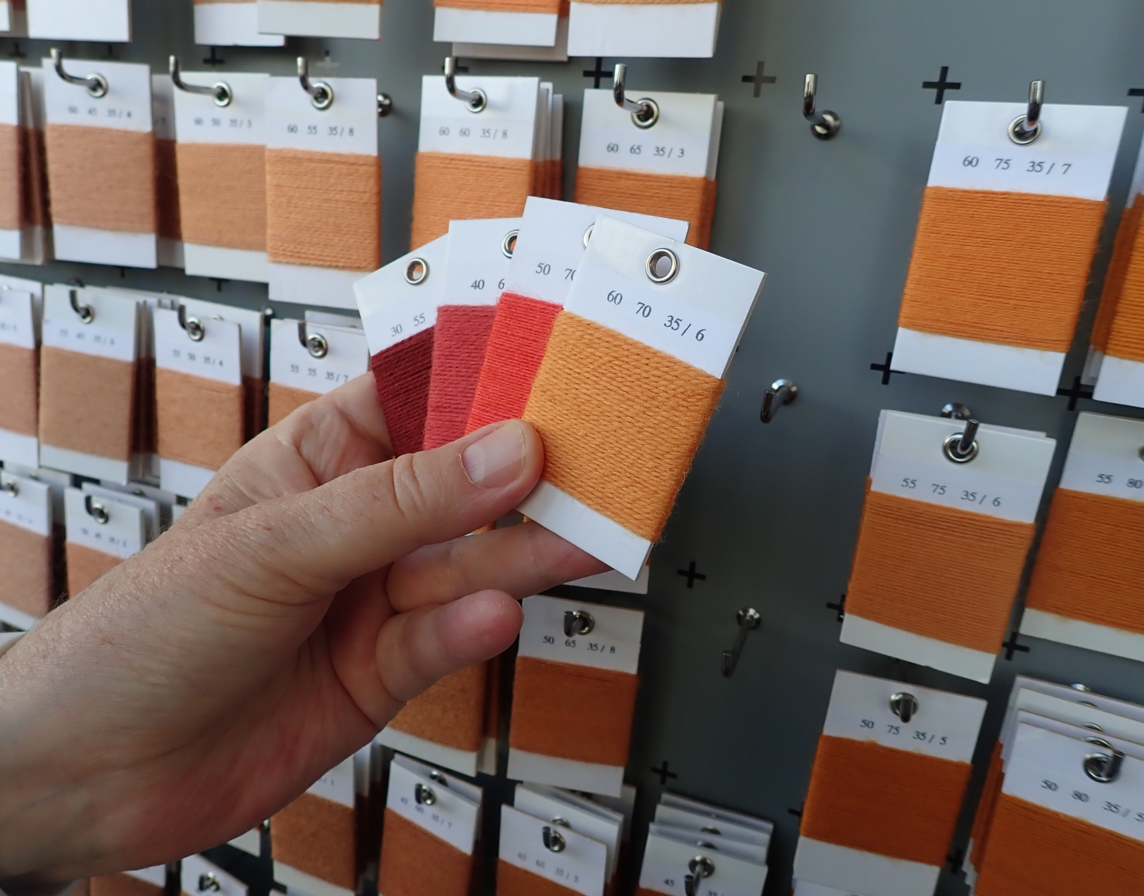 Echantillonnage au nuancier des Manufactures nationales de tapisserie et de tapis (France)